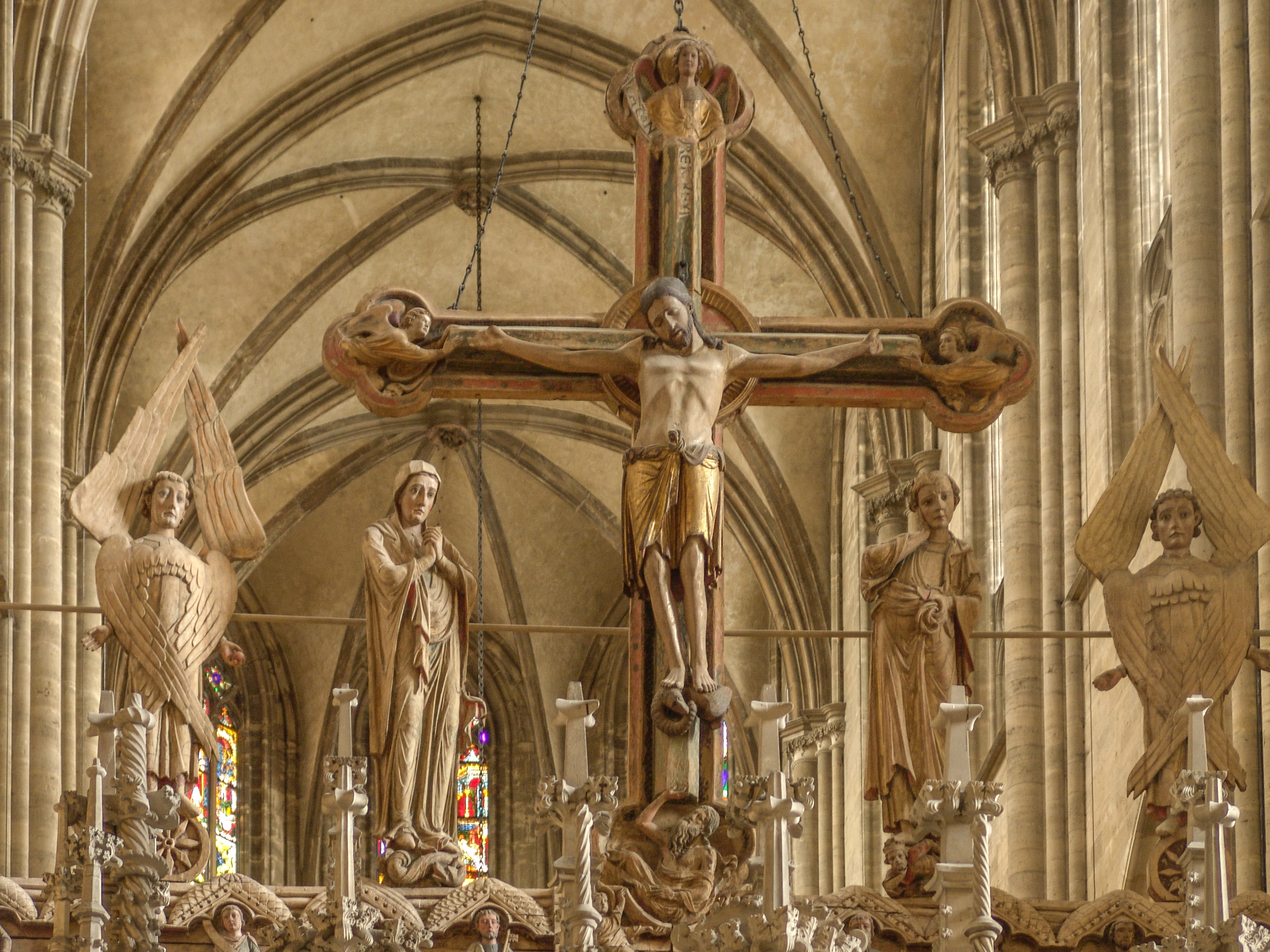 Halberstädter Dom, Lettnerfiguren